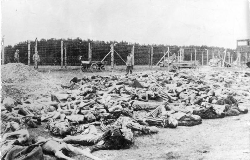 Zentralbild Das berüchtigte hitlerfaschistische Konzentrationslager Buchenwald auf dem Ettersberg nördlich von Weimar ( mit etwa 135 Außenkommandos). Am 11.4.1945 befreite die militärische Organisation des Internationalen Lagerkomitees Buchenwald von S3 - Mördern. UBz: eine Aufnahme eines amerikanischen Reporters mit Bergen von Leichen erschossener politischer Häftlinge nach der Befreiung.